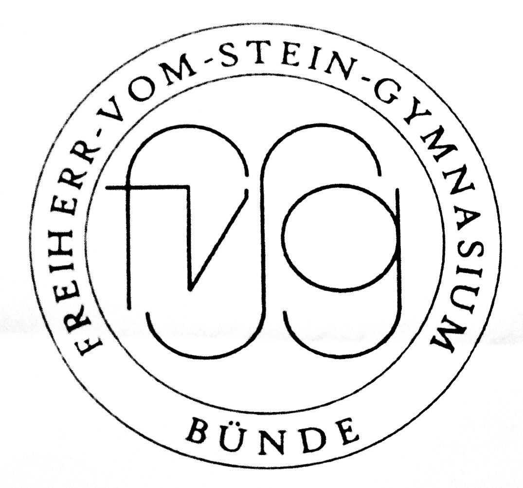 Altes Logo des Freiherr-vom-Stein-Gymnasiums Bünde